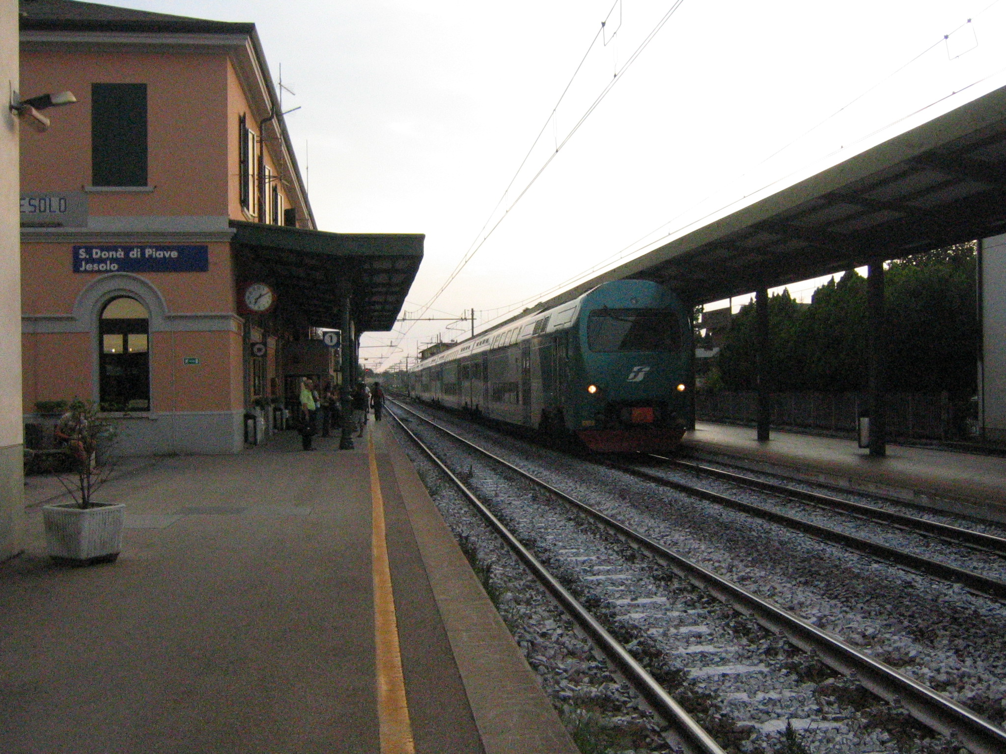 TAF in sosta al secondo binario della stazione di San Donà di Piave-Jesolo